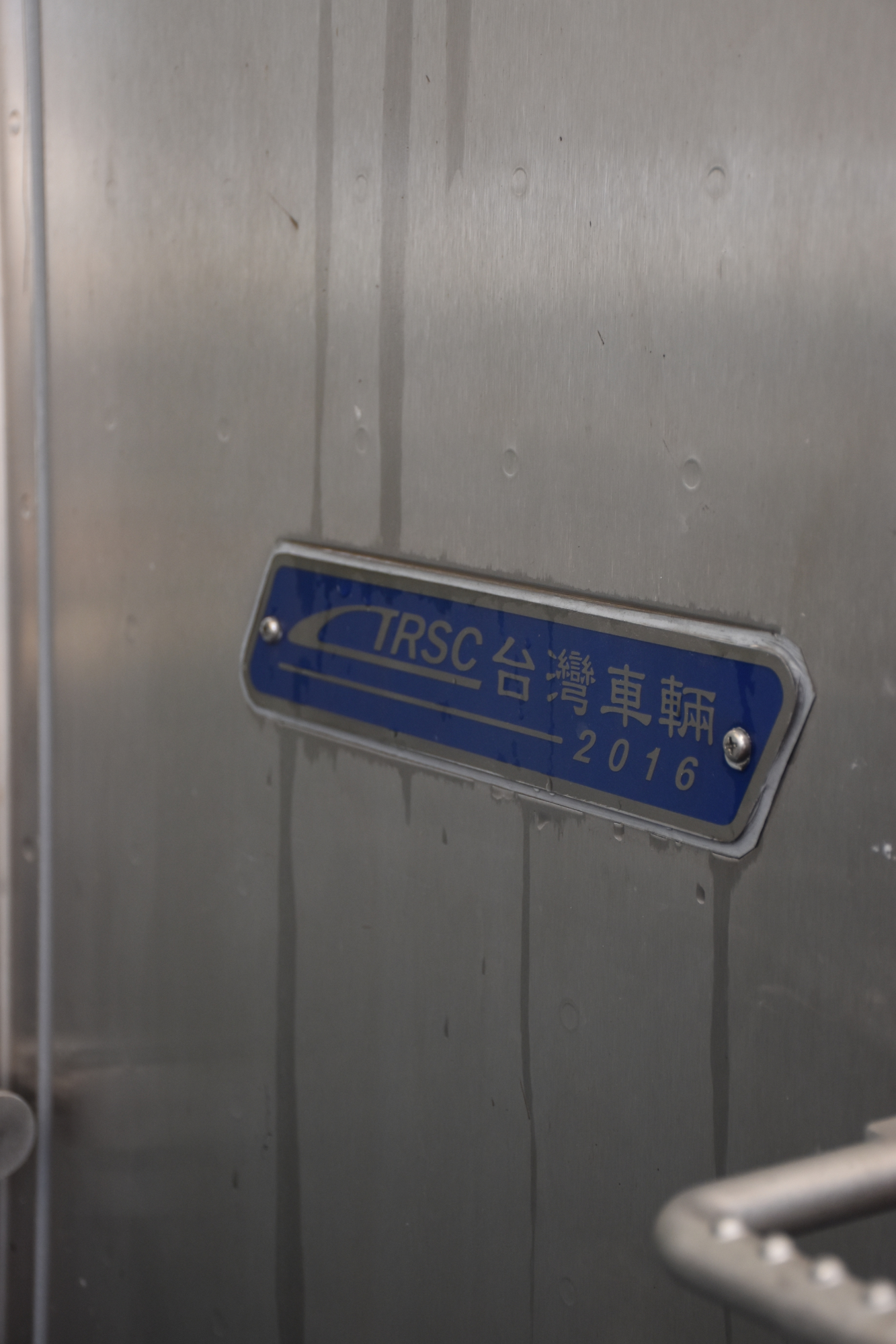 臺灣鐵路管理局型電聯車EMU881+882車外之台灣車輛銘板。